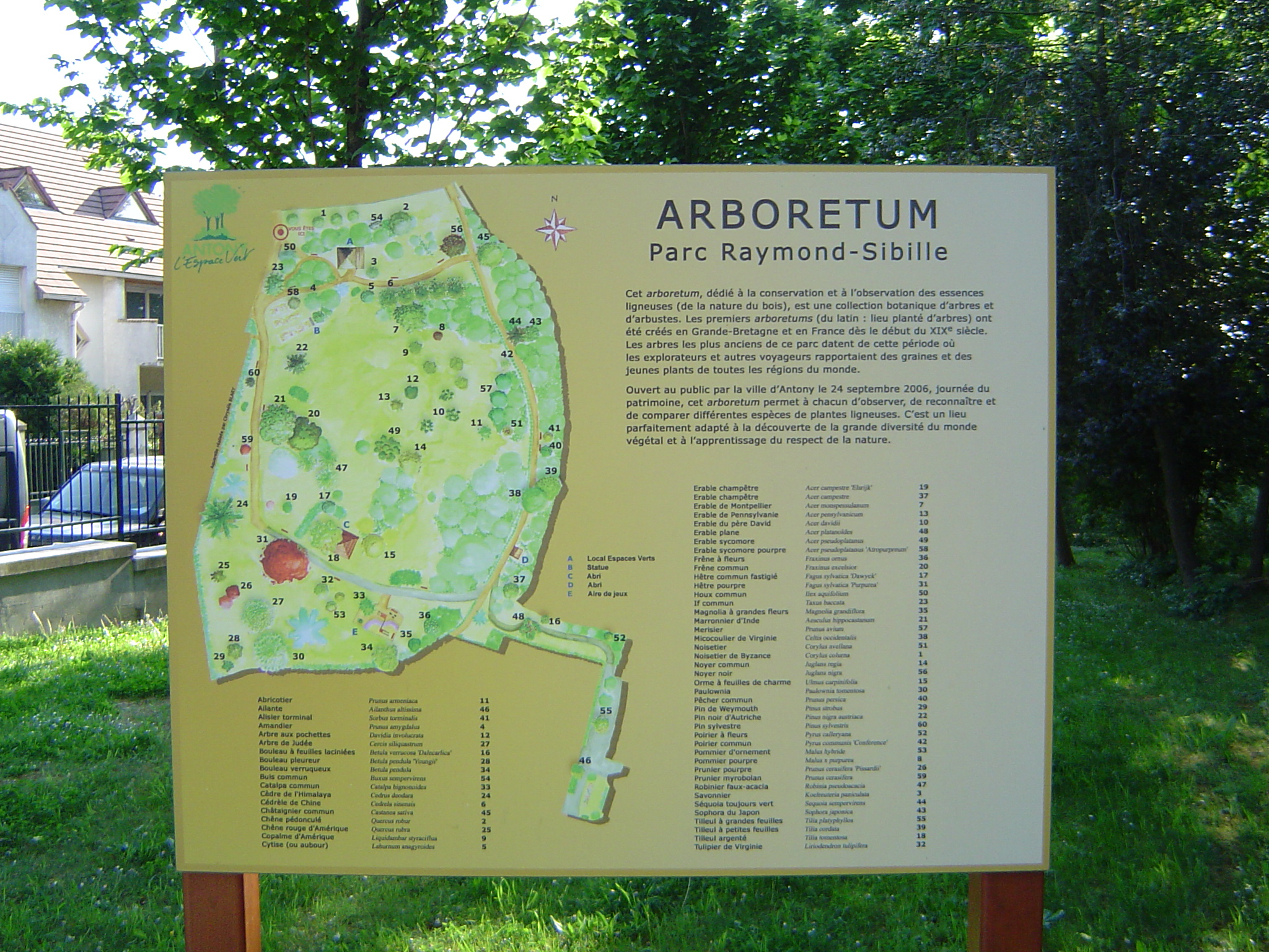 Parc R. Sibille à Antony